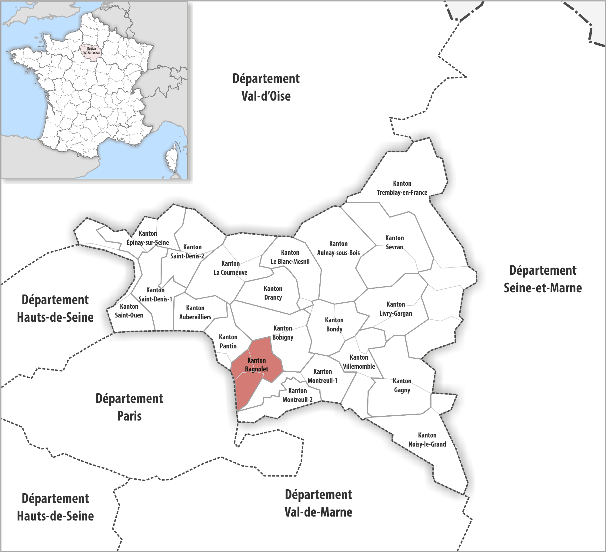 Lage des Kantons Bagnolet